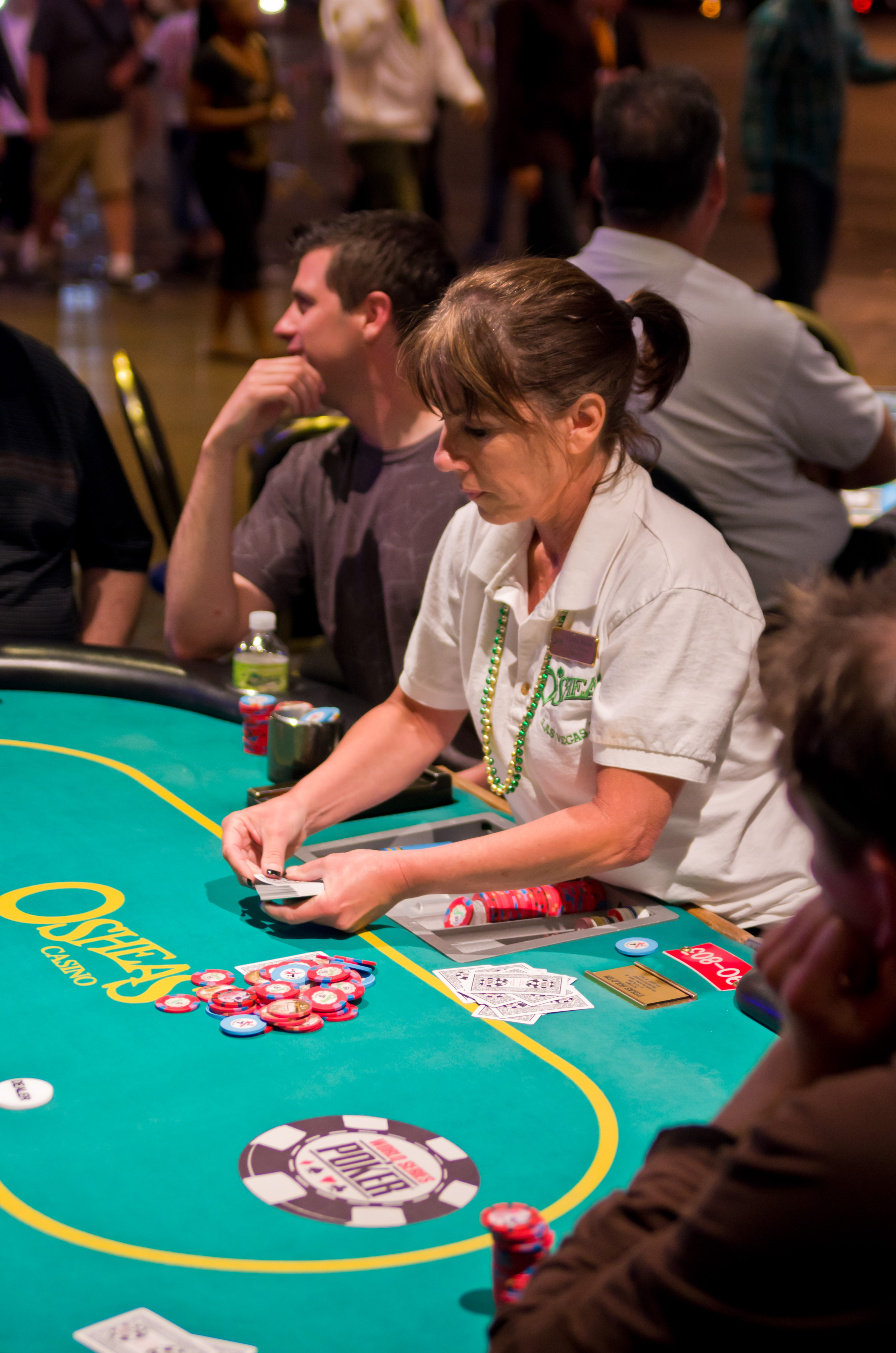 idnPoker in a casino.